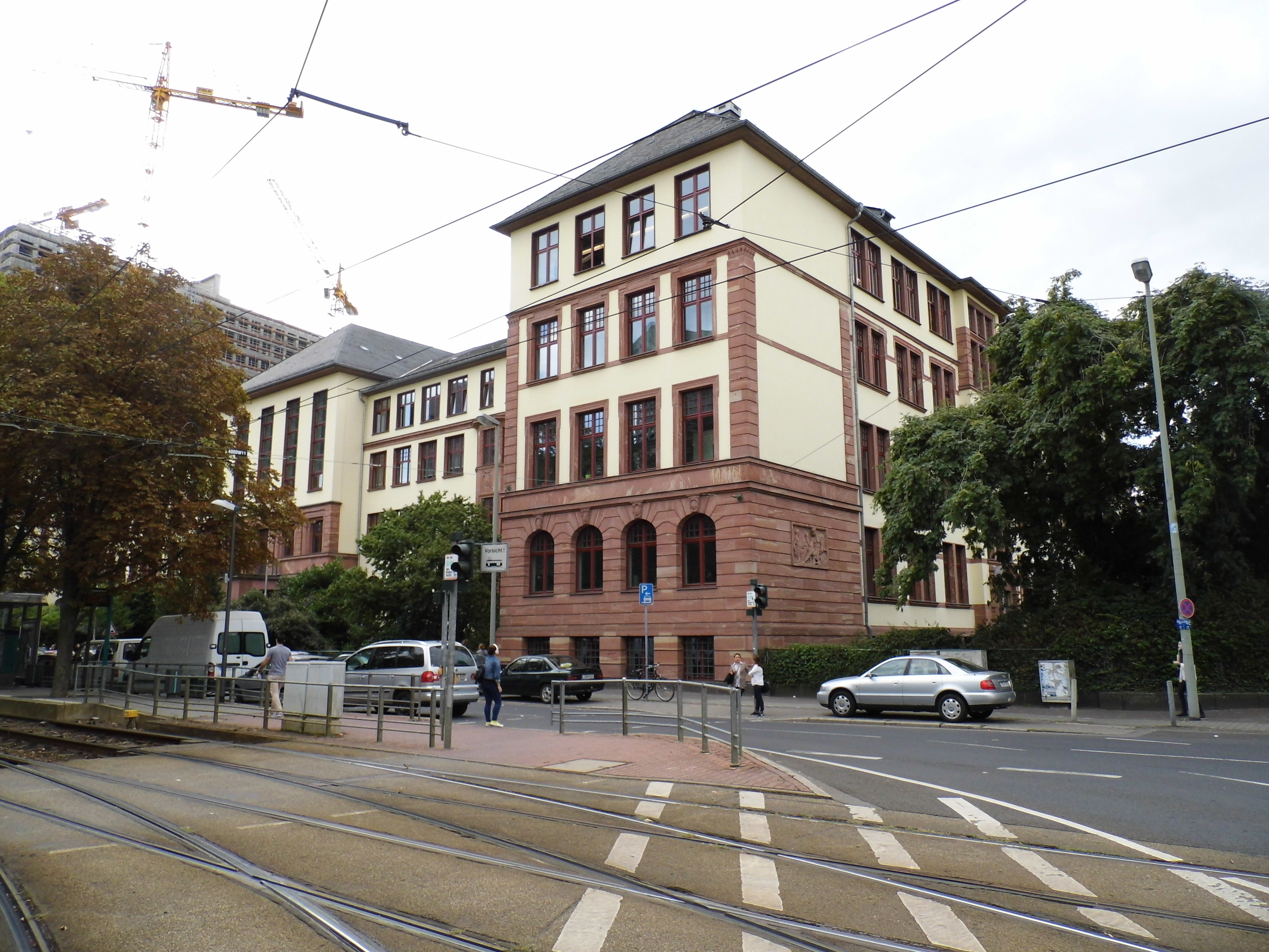 Frankfurt, Hamburger Allee 23, Werner von Siemens Schule